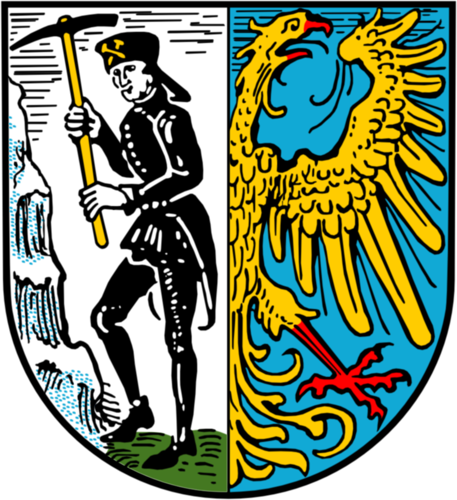 Das Wappen der Stadt Beuthen. Schläsch: Doas Woappa der Stoadt Aeberbeuthn.